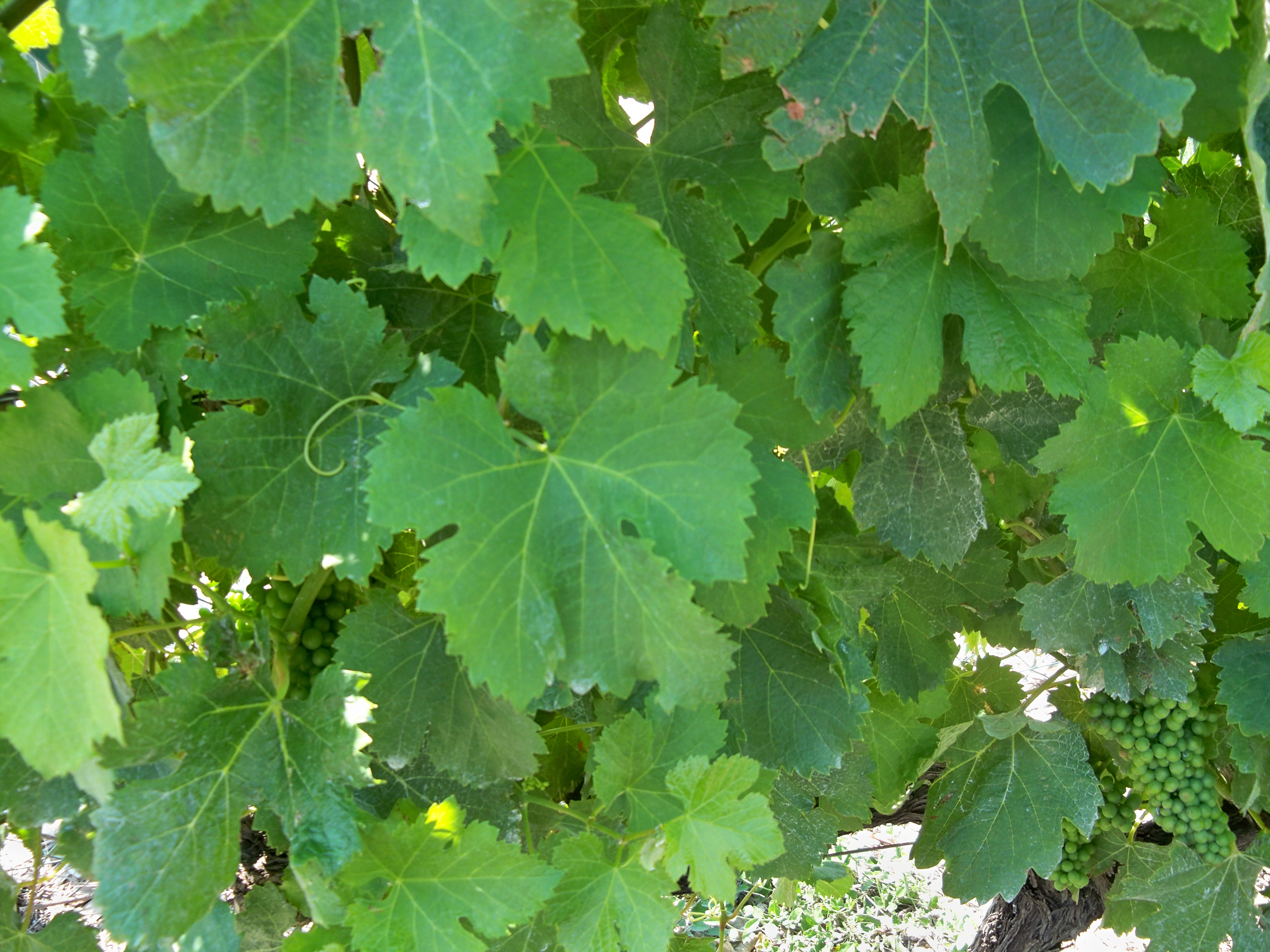 Feuilles de vigne - Vionier